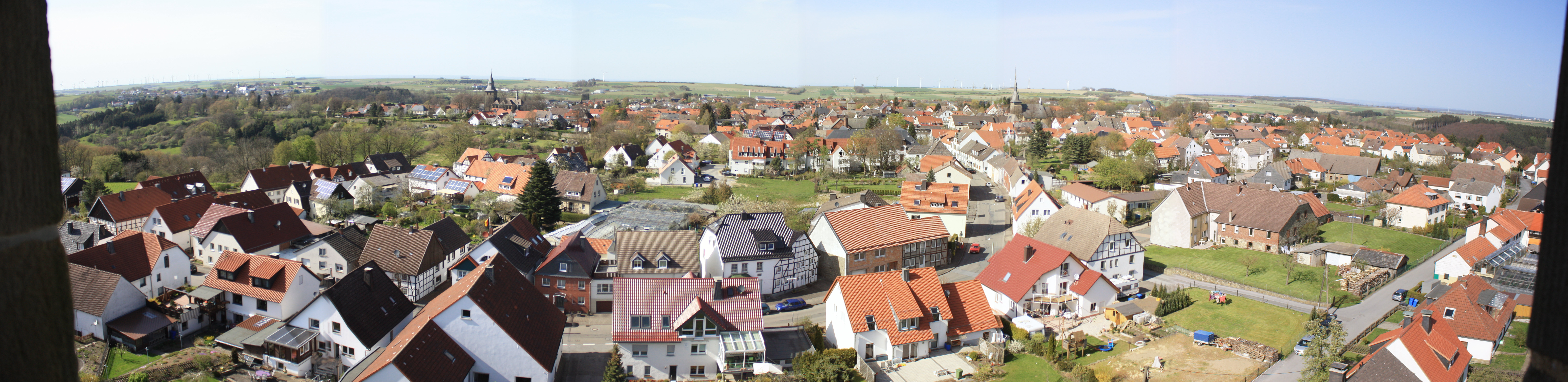 Panorama der Stadt Rüthen; aufgenommen vom örtlichen Wasserturm